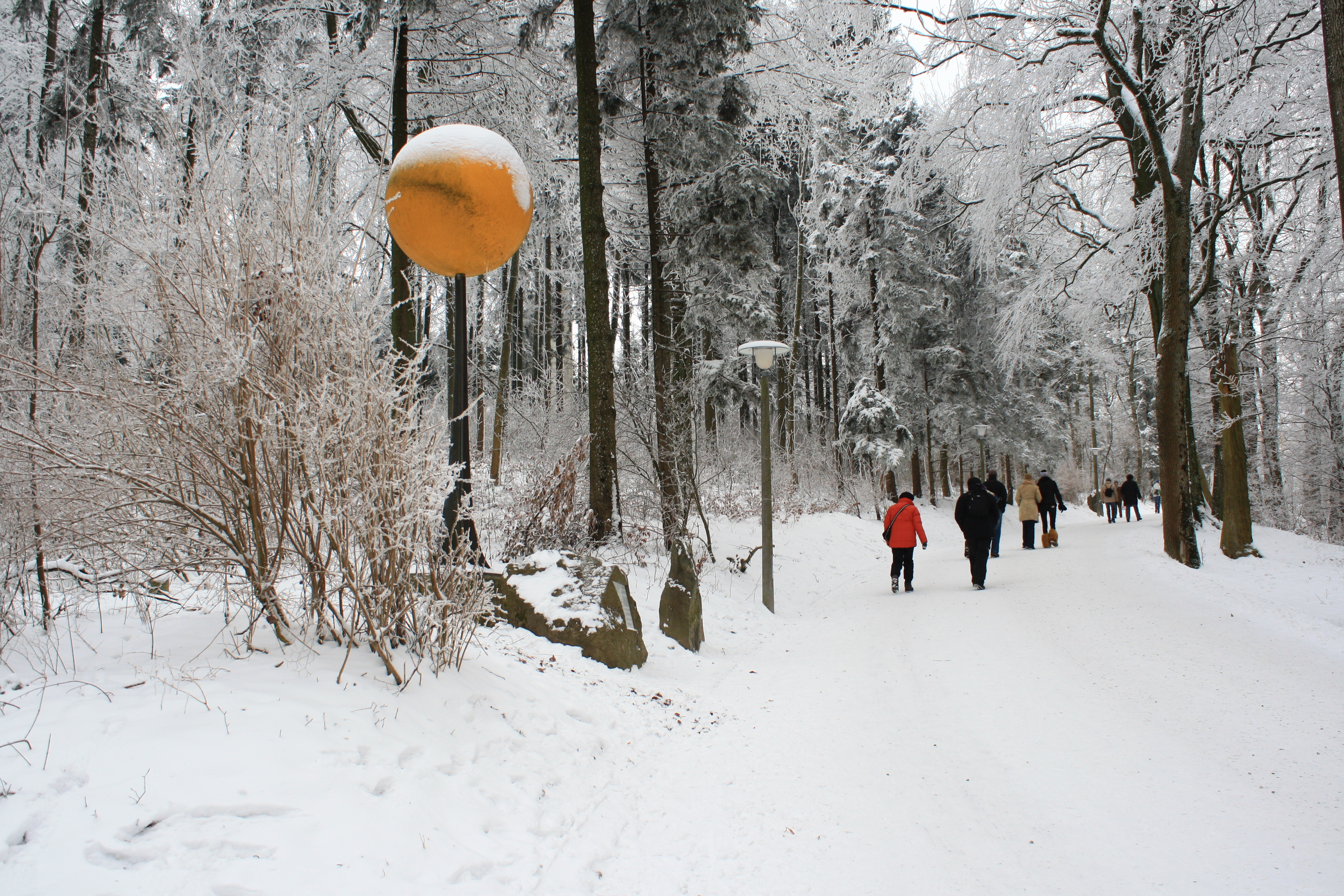 Planetenweg Uetliberg-Felsenegg - Sun nearby Uetliberg Uto Kulm